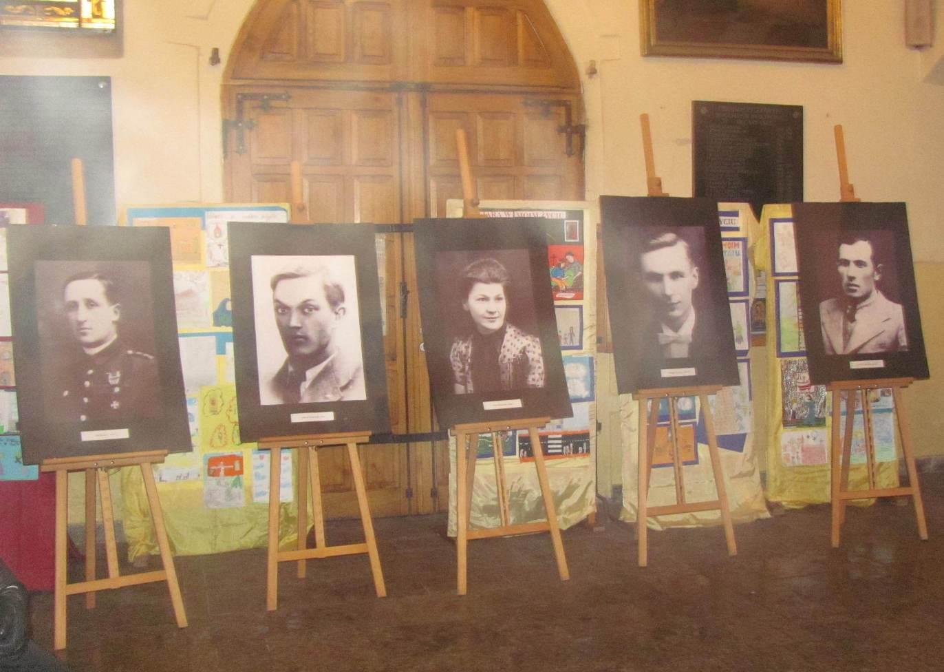 Przasnysz, 2012r. Wystawa w Muzeum Historycznym w Przasnyszu -Skazani na śmierć działacze NSZ, 17 grudnia 1942r. Przasnysz